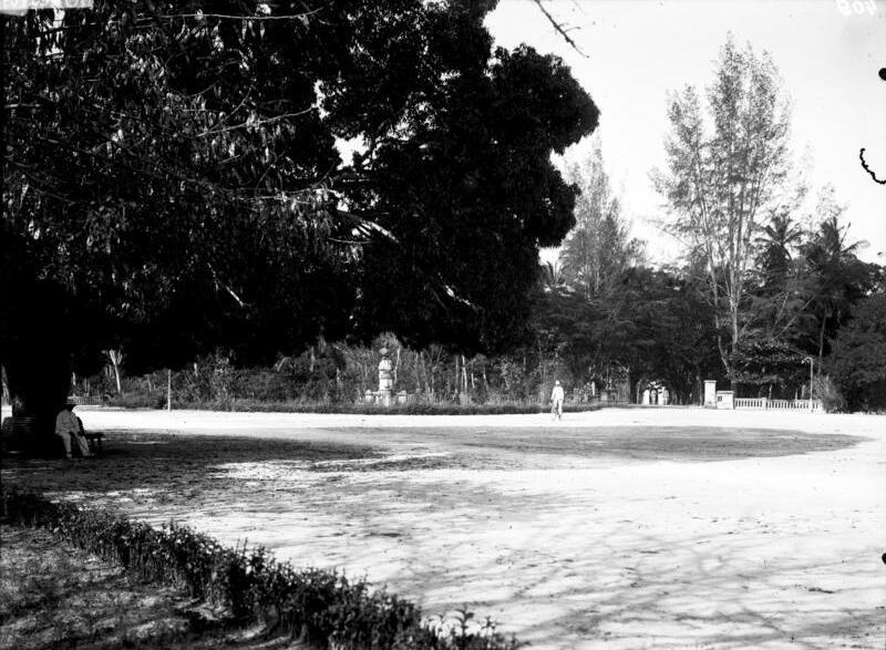 Daressalem, Bismarckplatz